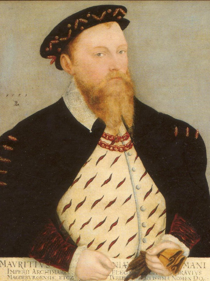 Kurfürst Moritz von Sachsen (1521-1553), Ausschnitt aus dem Ehebild von Lucas Cranach d.J.